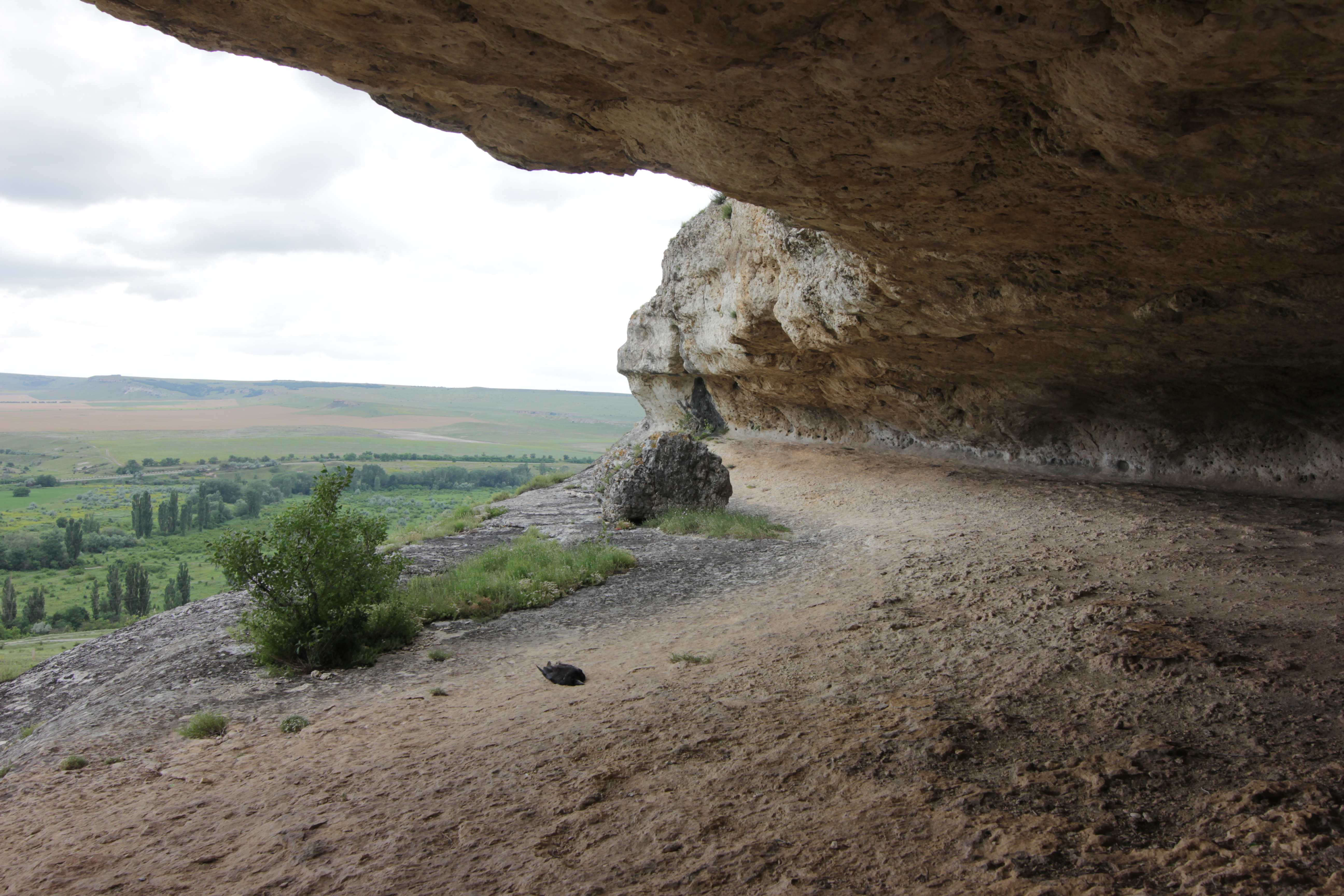 Красная балка: в 2 км севернее села, с. Белая Скала, Белогорский район, Крым This object is located on the Crimean Peninsula and recognized as a protected area by both Russia and Ukraine under the ID: 8210203 / -, respectively. The legal status of the Crimean region is currently disputed.